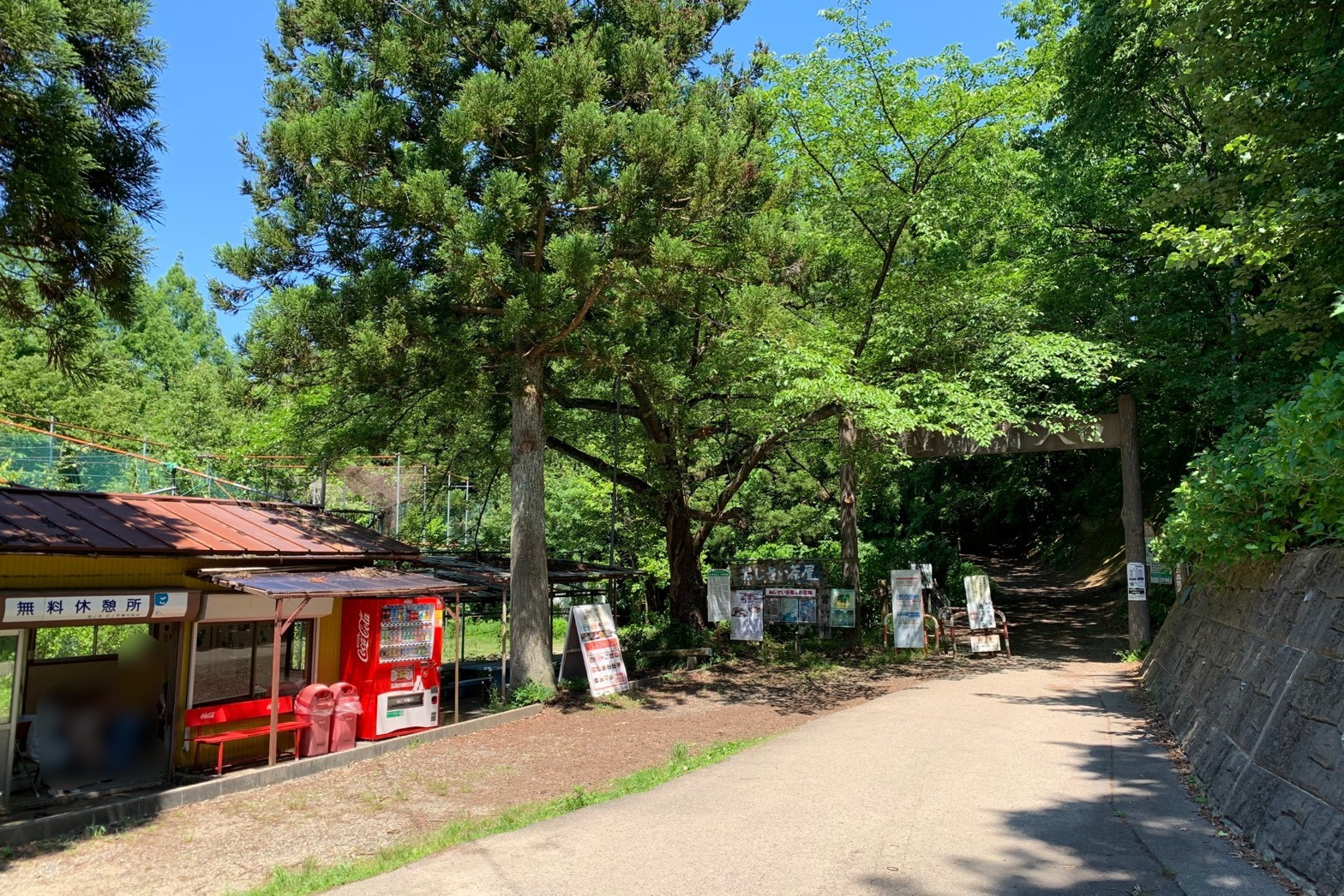 湯田上温泉脇の護摩堂山登山口（2020年5月）